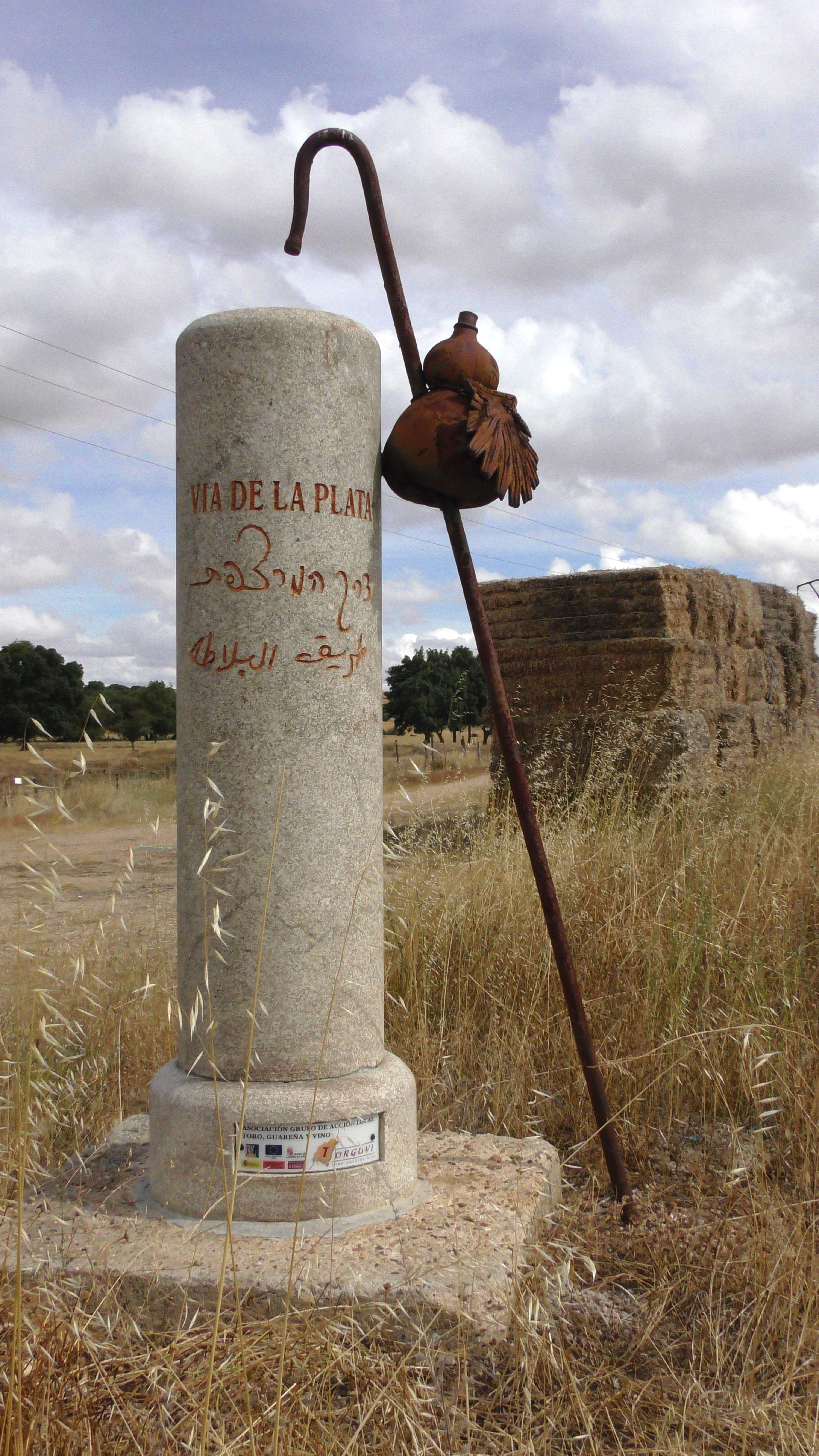 Mayalde. En la carretera hacia El cubo del Vino